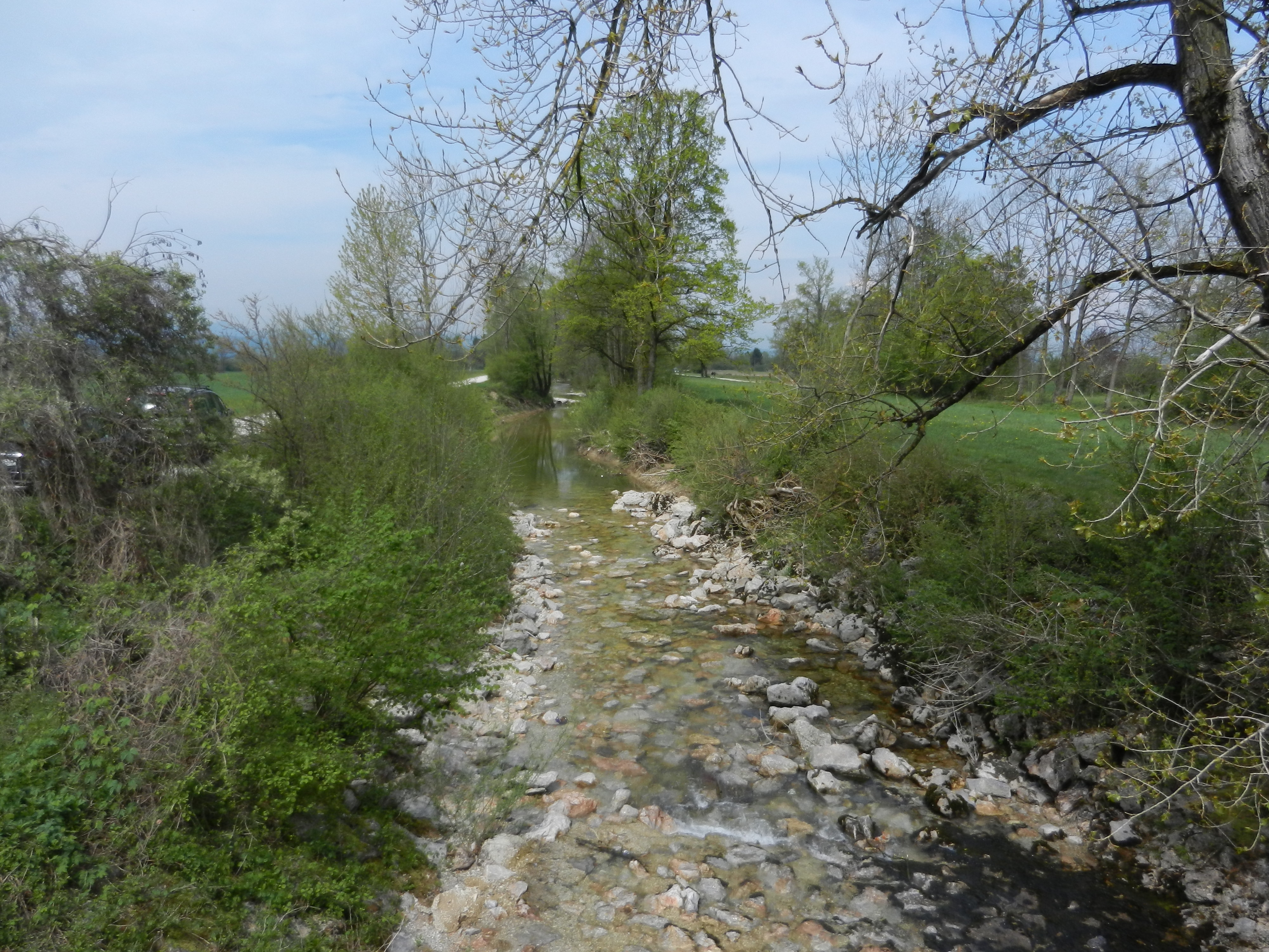 Regulirana Iška na Ljubljanskem barju.